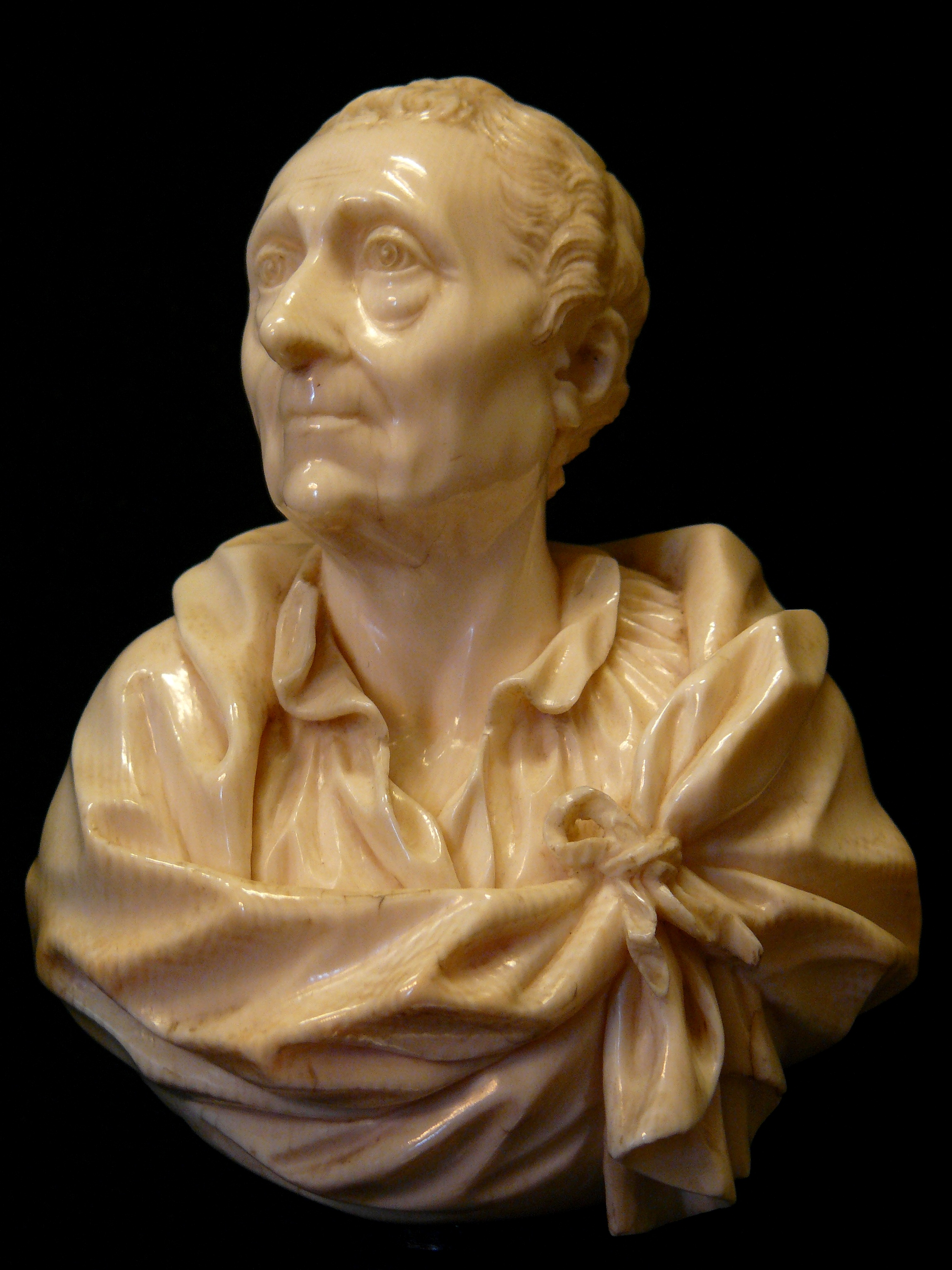 Buste de Montesqieu